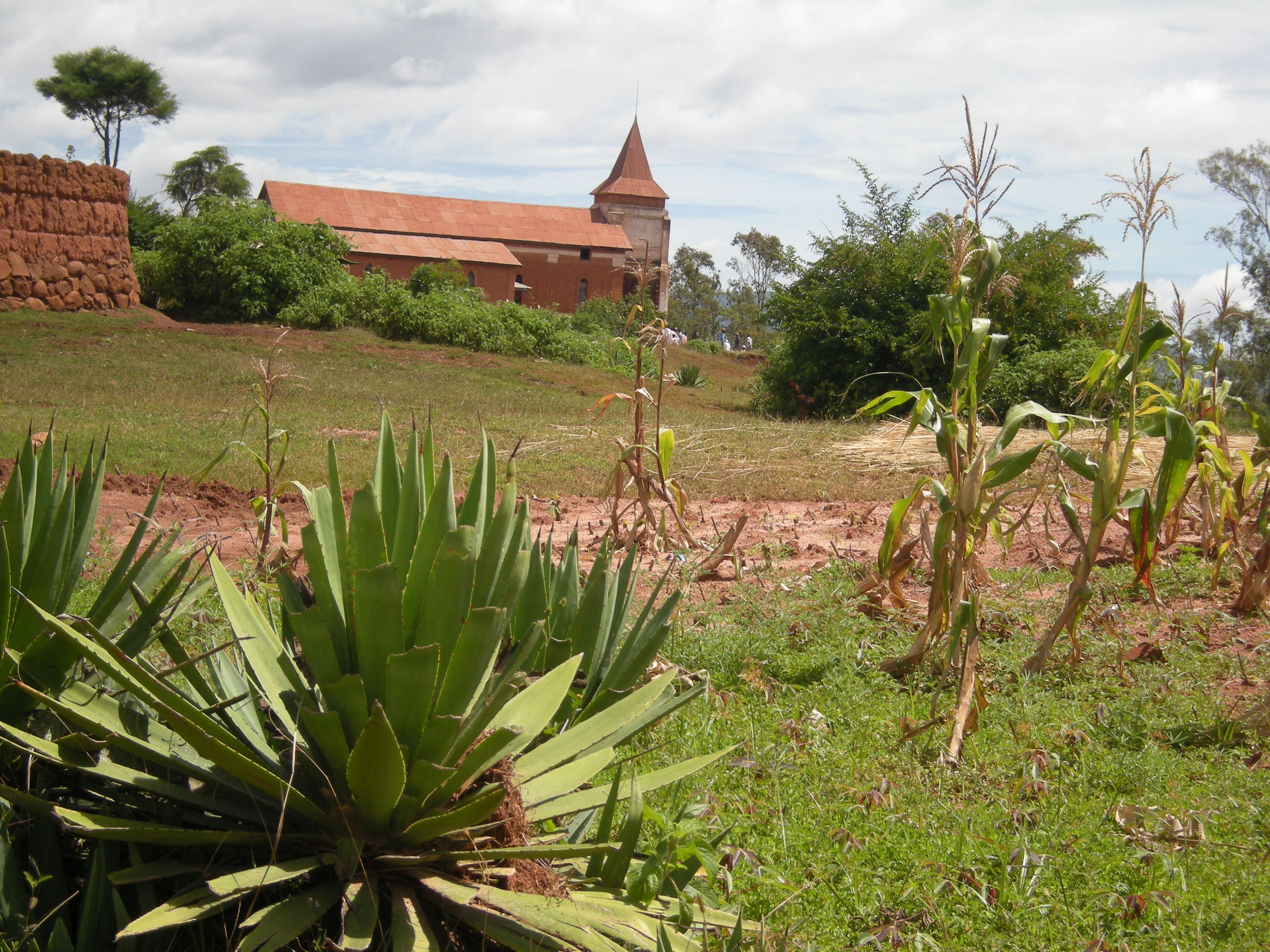 Ampahimanga Arivonimamo